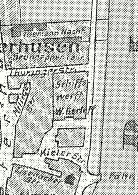 Karte des Gebiets um die Schiffswerft Gerloff in Westerhüsen